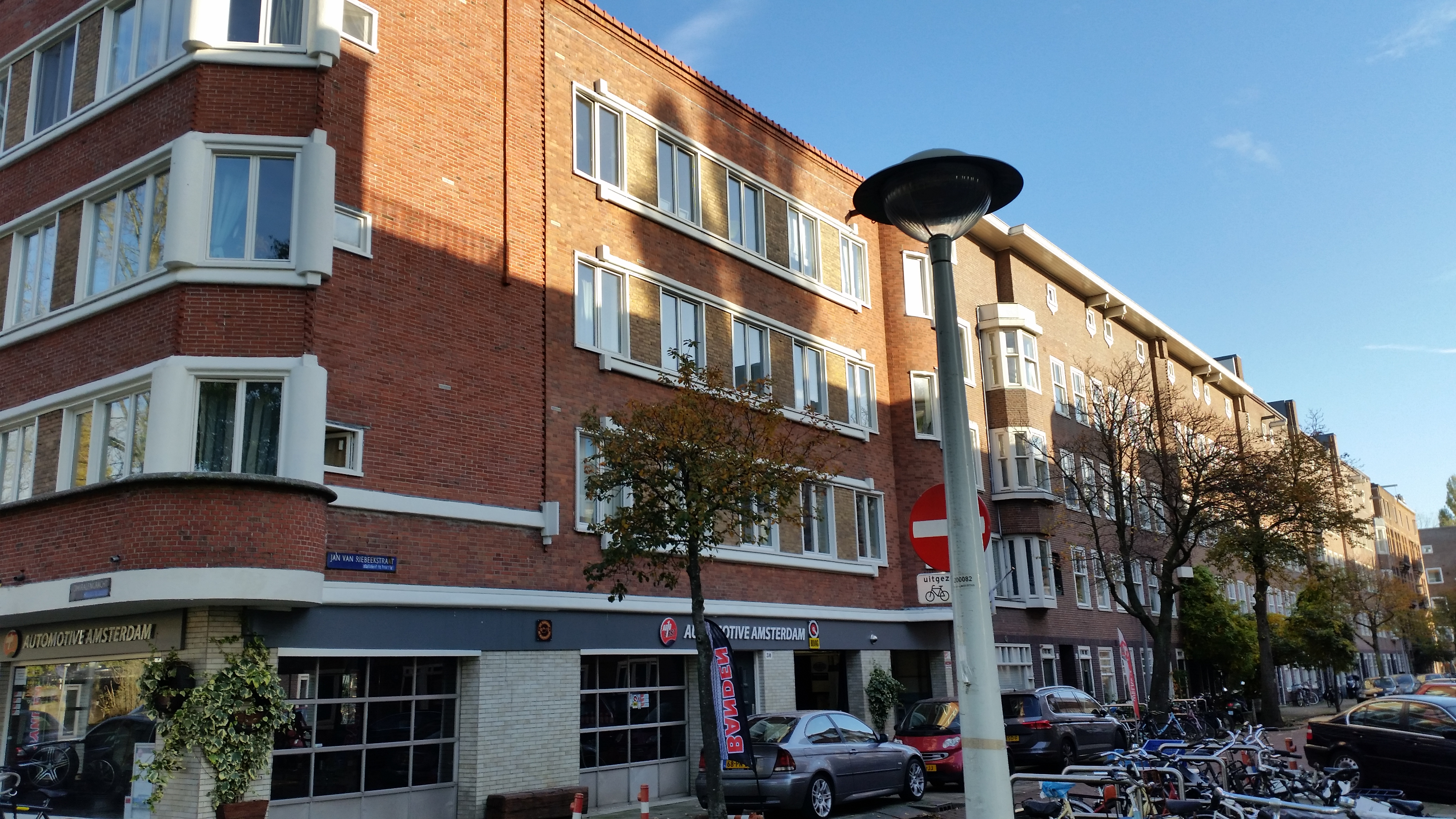 Gebouwen aan de Jan van Riebeekstraat, Amsterdam-West